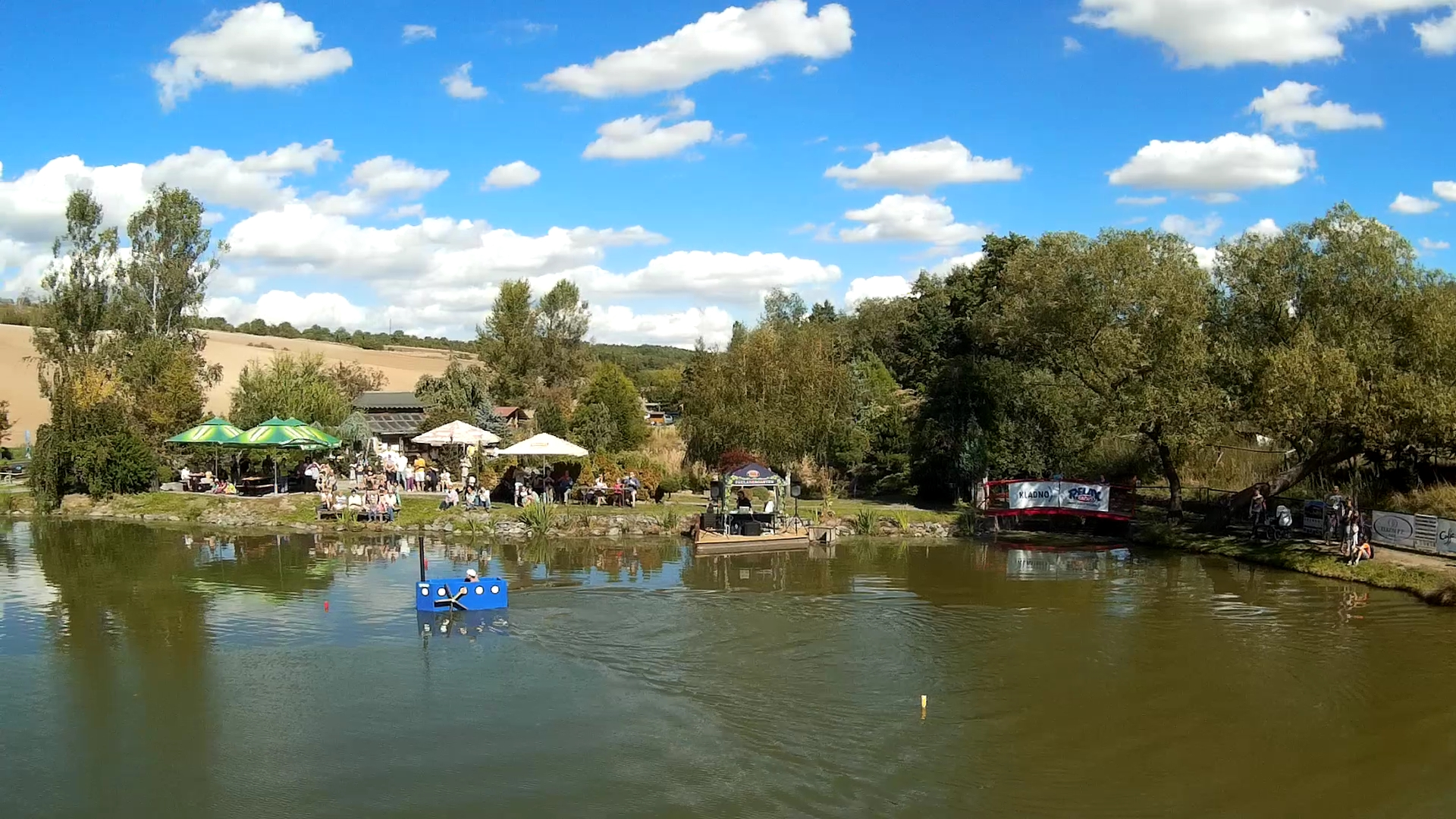 Pravidelné kulturní a sportovní akce pro veřejnost